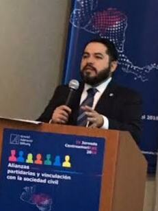 Conferencia impartida por Armando Rodríguez Cervantes sobre "alianzas partidistas y parlamentarias", representando a México y al PAN dentro de la IV Jornada CentroameriKAS, organizada por la Fundación Konrad Adenauer. Asistieron varios partidos políticos humanistas de América Latina (Tegucigalpa, Honduras, 14/VII/2016).